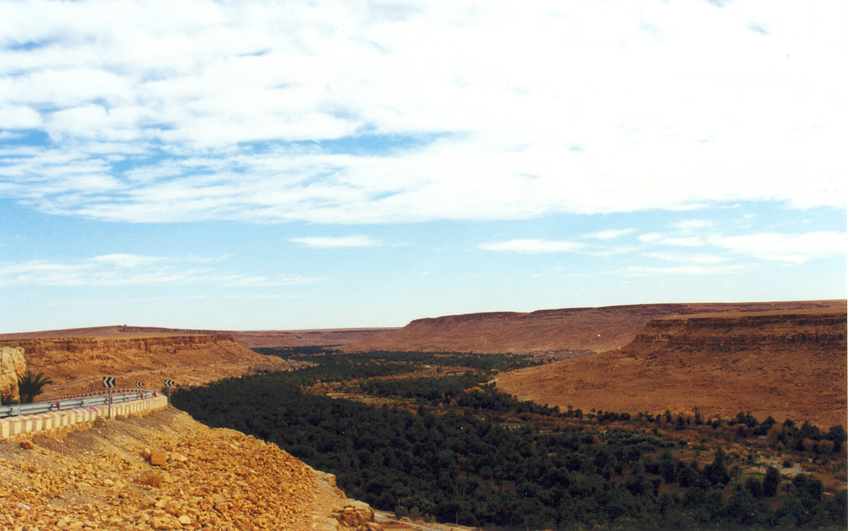 Tafilalt